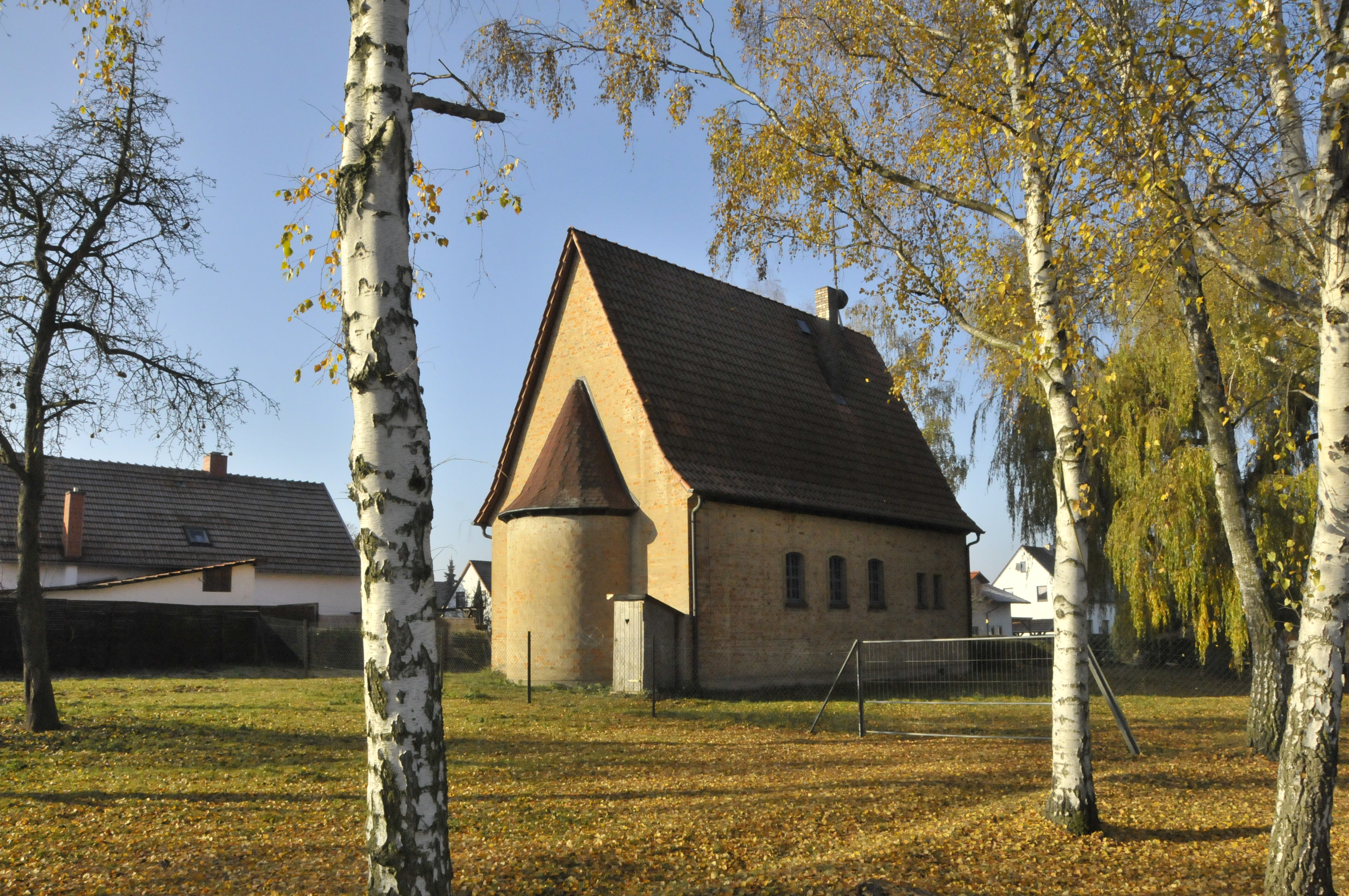 Gotha-Töpfleben, Kirche von 1954